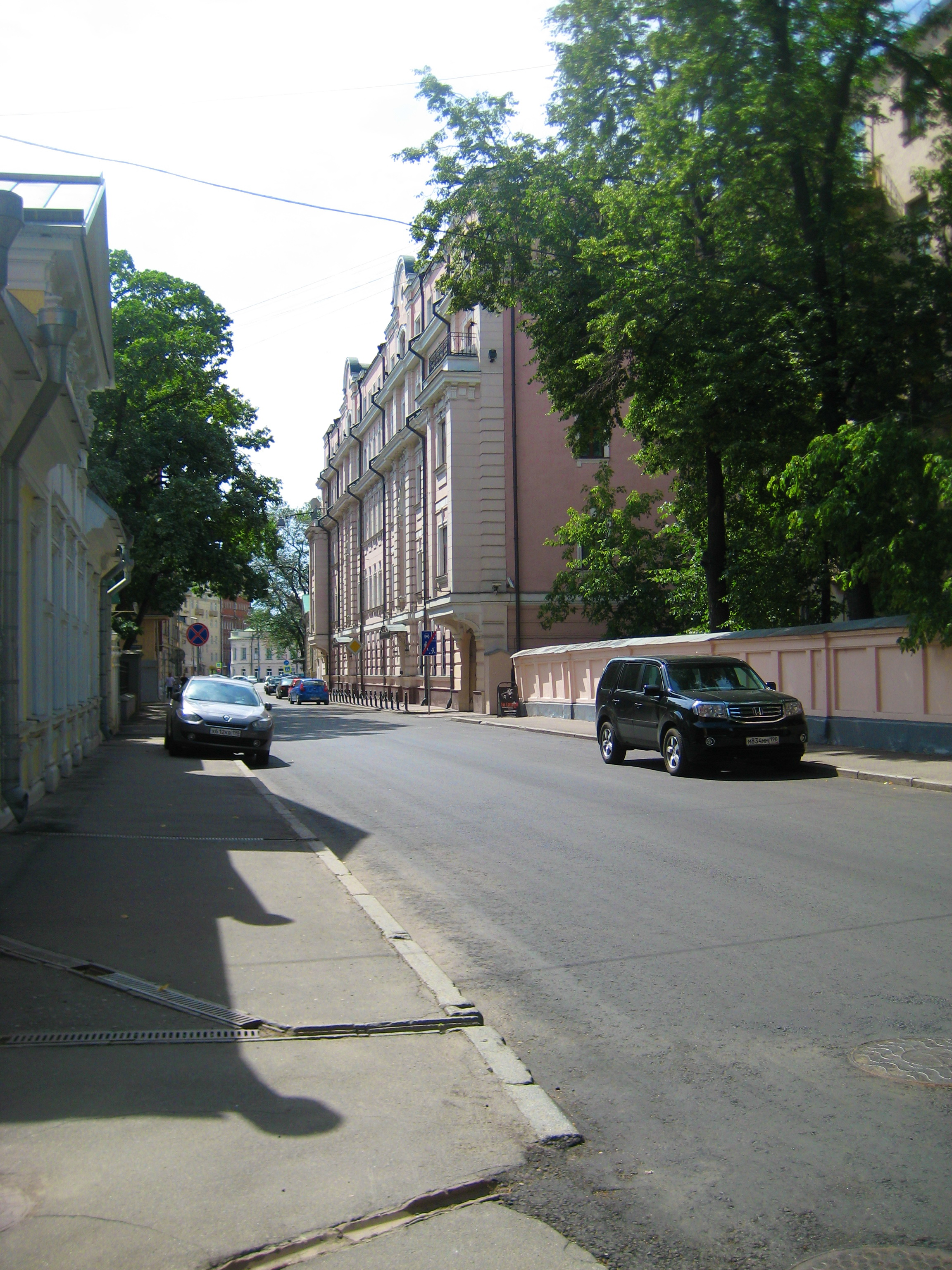 Большой Лёвшинский пер., 10 строение 1 Пятиэтажное административное здание. Построено в 1901 году как доходный дом. Архитектор Н. И. Якунин. В доме жил виолончелист А. А. Брандуков.